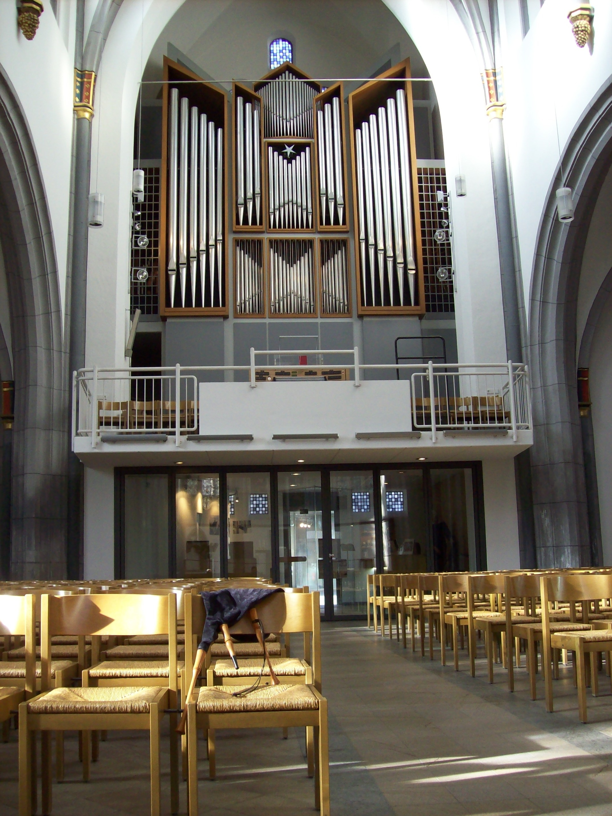 Peterorgel der Antoniterkirche in Köln